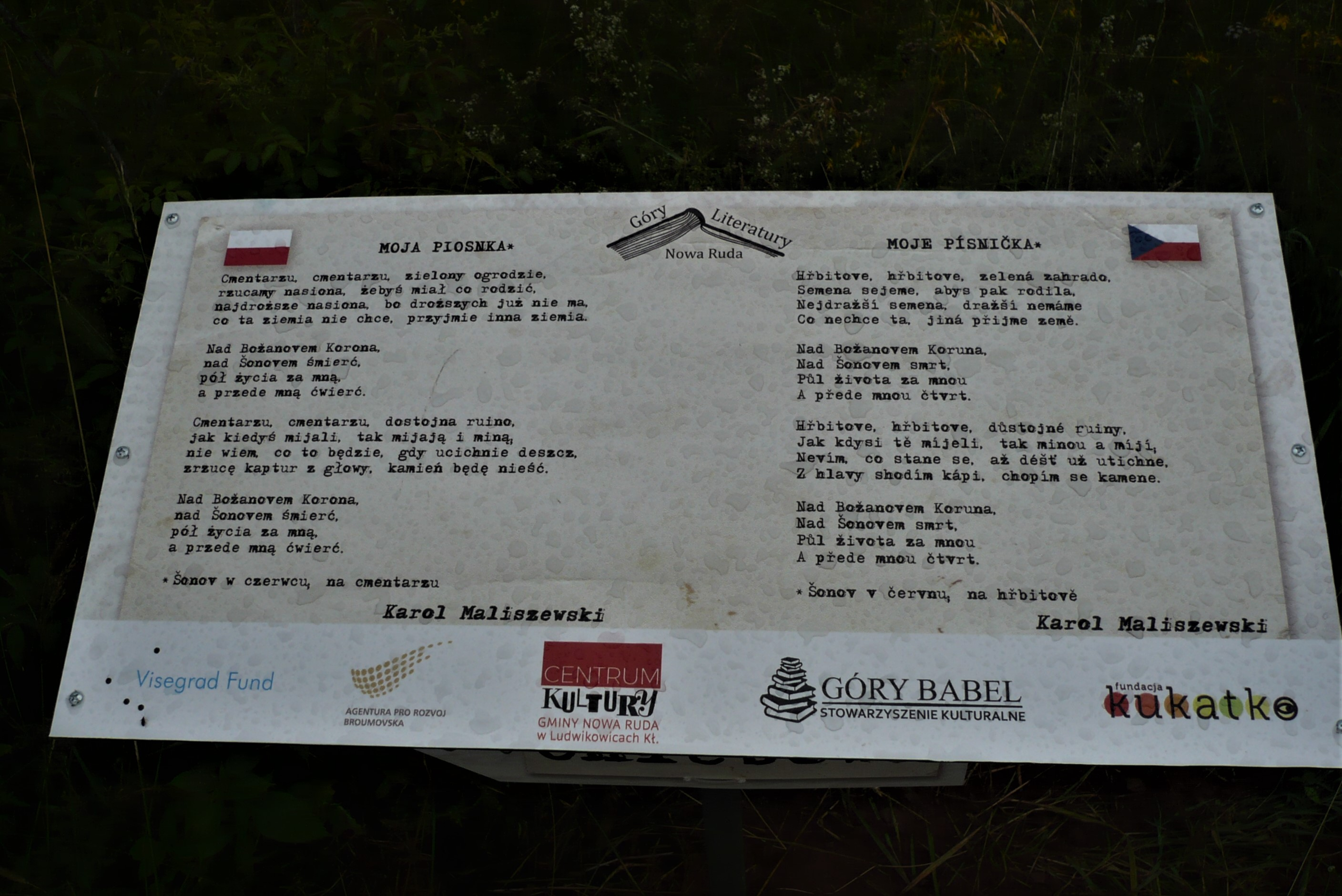 Tablica na Drodze Chlebowej Sonov - Włodowice